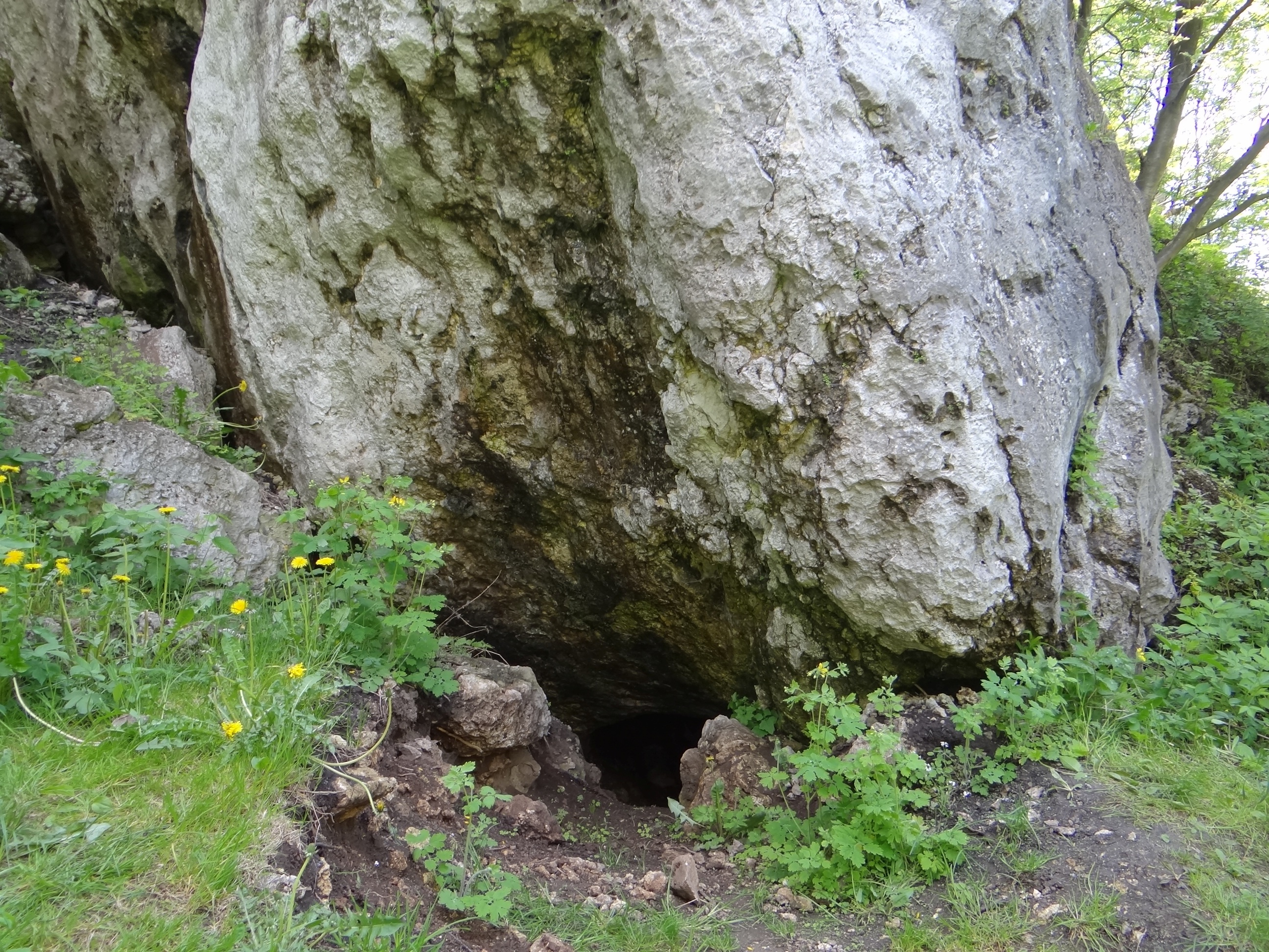 Jaskinia pod Agrestem w Żytnich Skałach we wsi Bębło